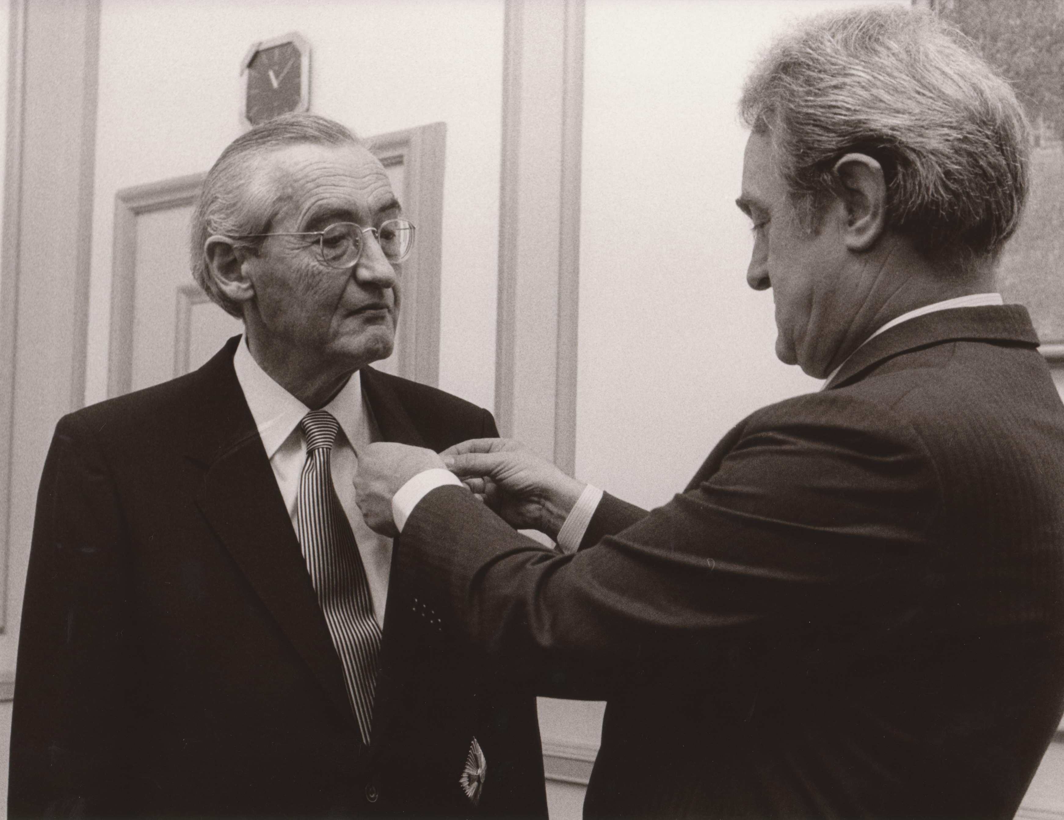 Großes Verdienstkreuz mit Stern - Bundesverdienstkreuz-Verleihung an Kurt Aland im Jahre 1983 durch Johannes Rau